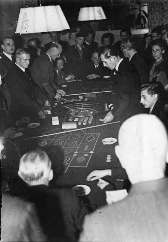 Bad Homburg, Eröffnung der Spielbank Illus-dpd Roulette soll neue Wohnungen schaffen Die erste Spielbank der Westzone eröffnet. In Bad Homburg wurde am 23-10-48 die erste Spielbank in der Westzone eröffnet. Zwei Drittel der Gewinne fließt dem hessischen Staat für Wiederaufbauzwecke zu. Unser Bild zeigt die Spielbank in Bad Homburg am Tage ihrer Eröffnung. 24-10-48